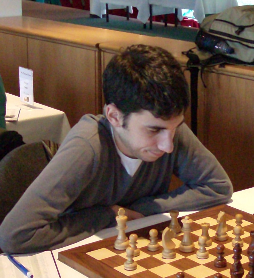 Laurent Fressinet, chess grandmaster